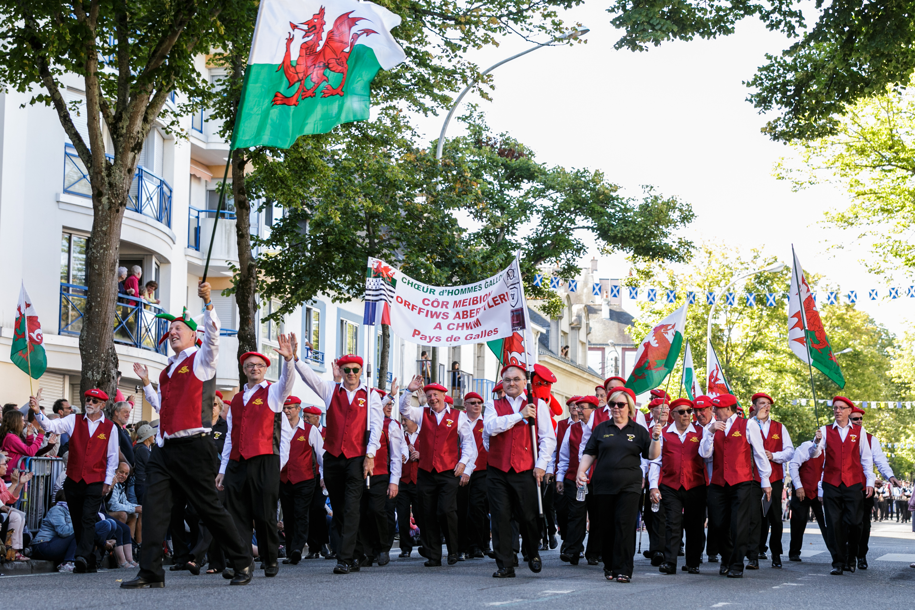 Festival Interceltique de Lorient 2017 - Grande parade des nations celtes - Côr Meibion Abertyleri Orffiws a Chwm (Pays de Galles)